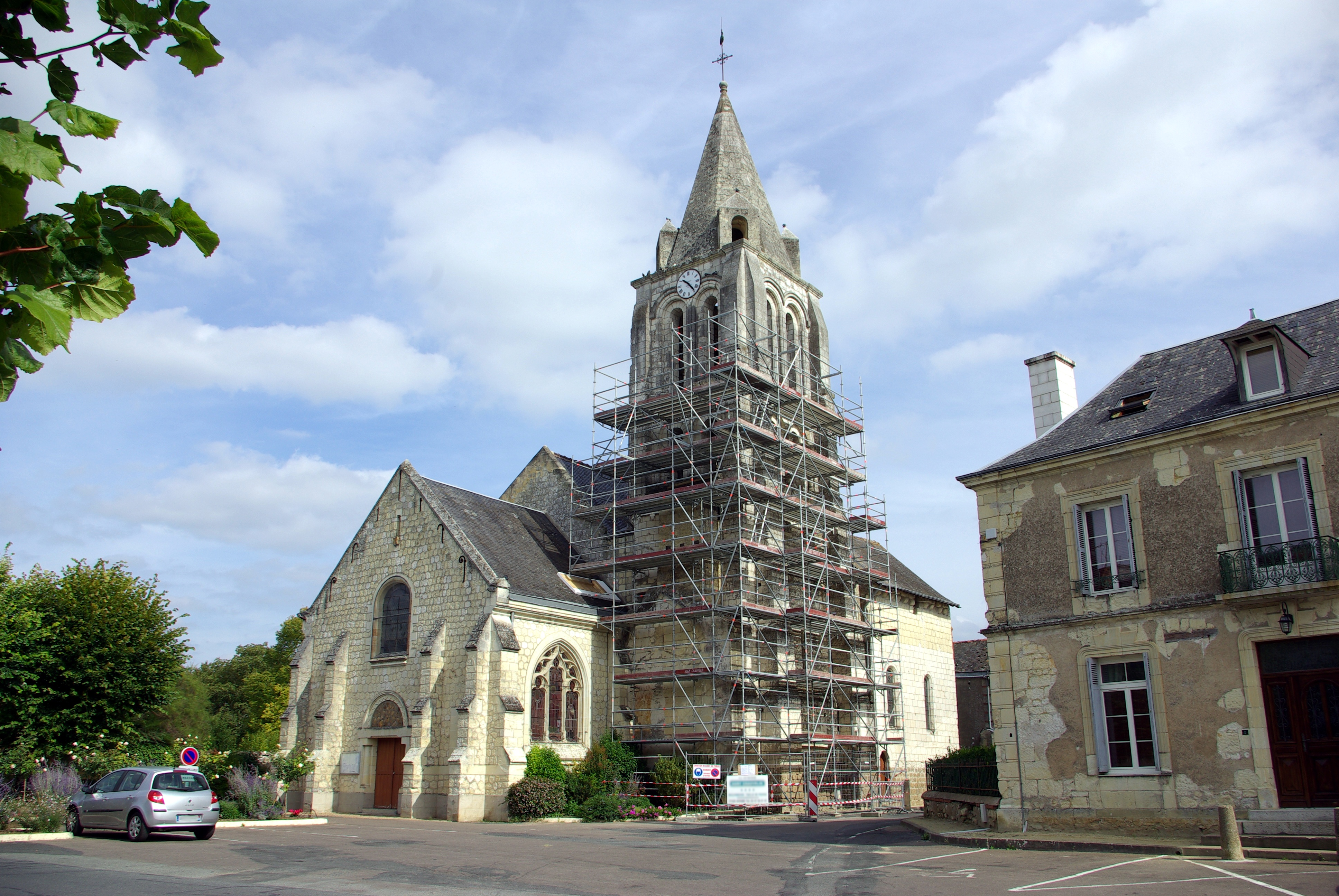 Église Saint-Germain de Benais.